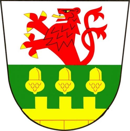 znak, Pravice, okres Znojmo